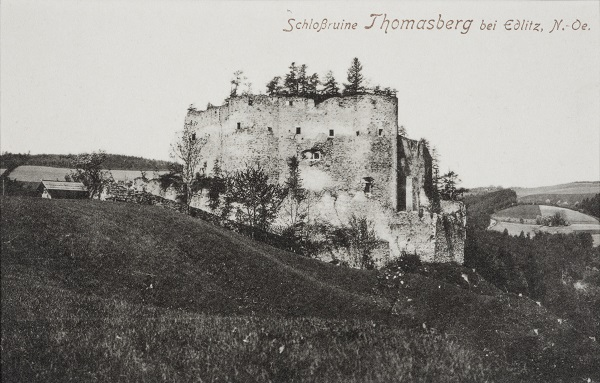 Ruiny zamku Thomasberg